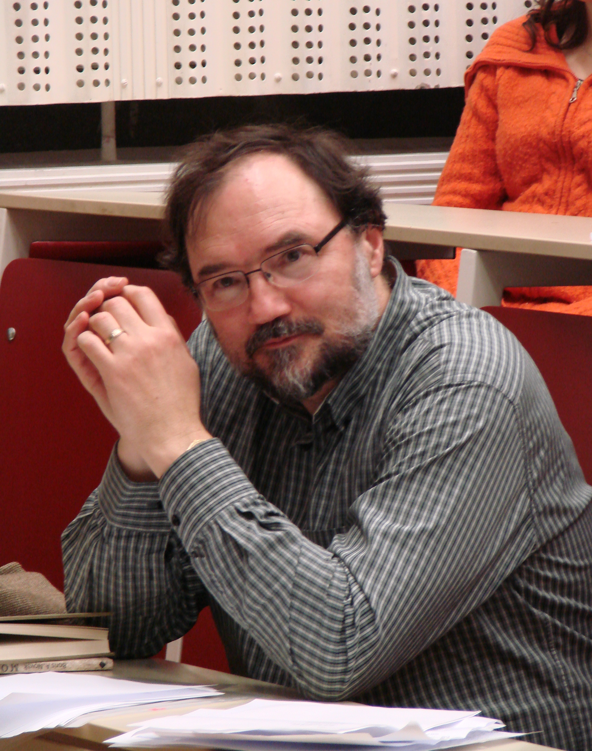 Boris A. Novak, slovenski pesnik in prevajalec, leta 2009